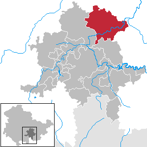 Uhlstädt-Kirchhasel in Thuringia - District Saalfeld-Rudolstadt